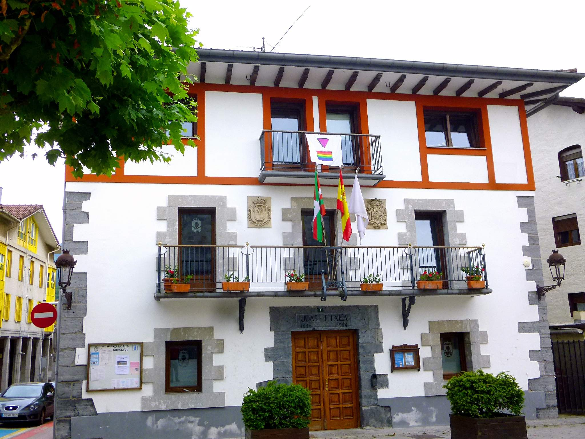 Ayuntamiento de Irura (Guipúzcoa)